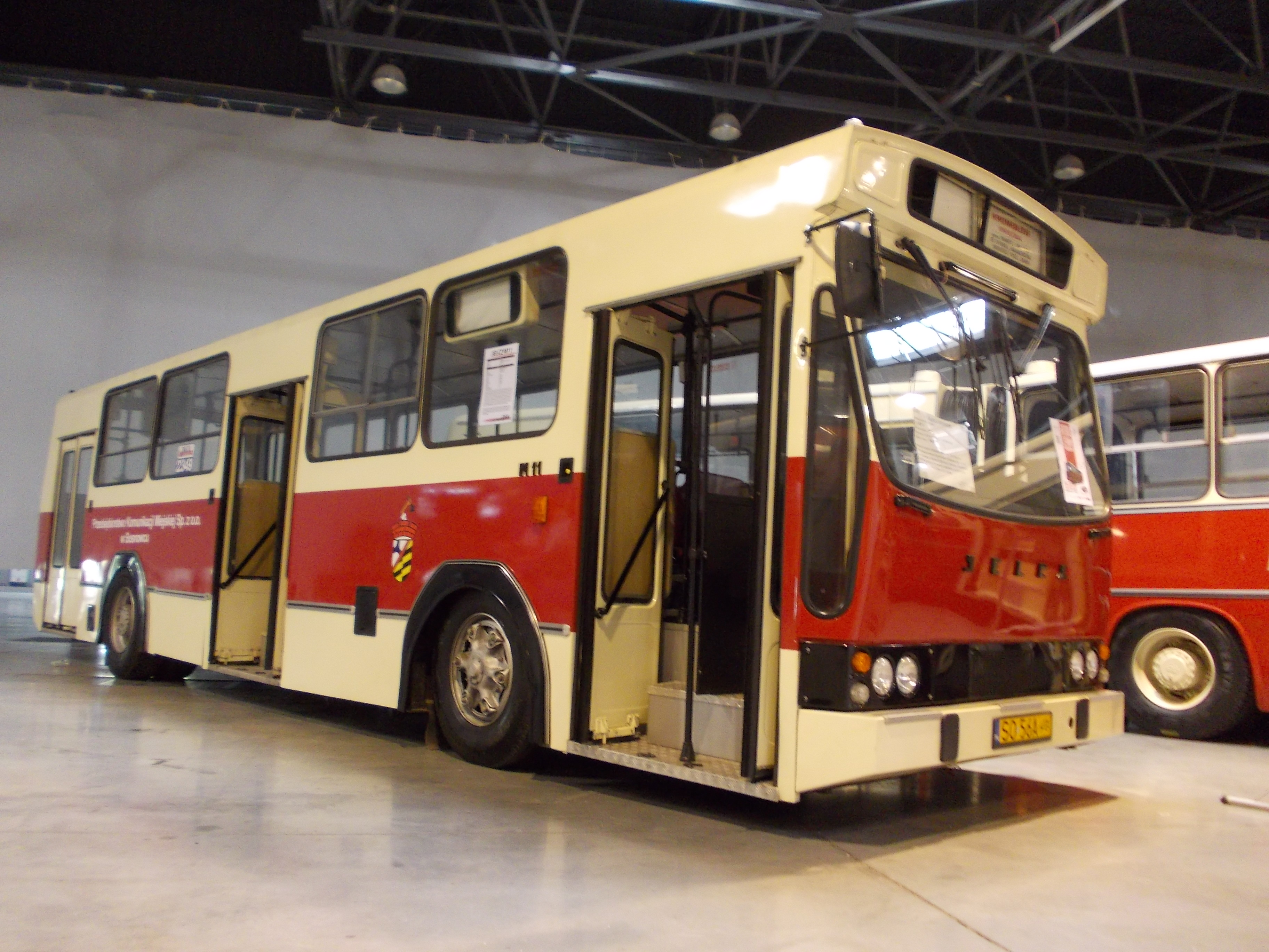 Jelcz M11 (rocznik 1988) podczas ekspozycji historycznej towarzyszącej targom SilesiaKOMUNIKACJA 2014 w Sosnowcu.